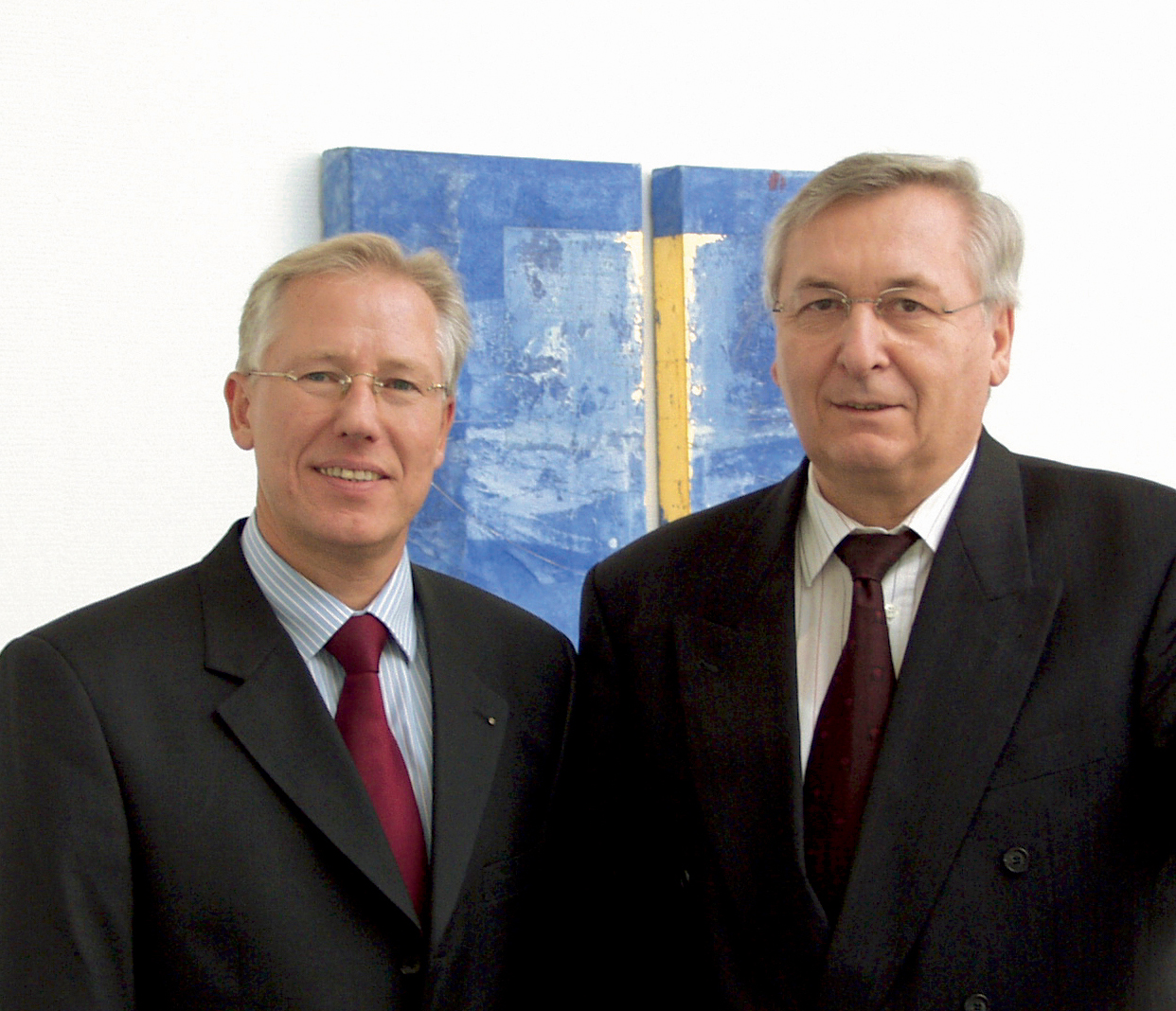 Führungswechsel bei BARTEC